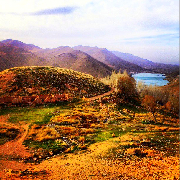 A Shot of Kine Vars Lake.